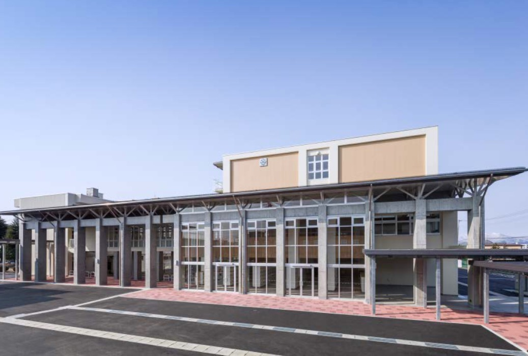 安積黎明高校の校舎